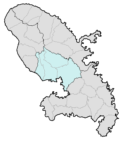 Carte de la Martinique avec l'arrondissement de Fort-de-France en couleur. Map of French department of Martinique with Fort-de-France "arrondissement" in color.